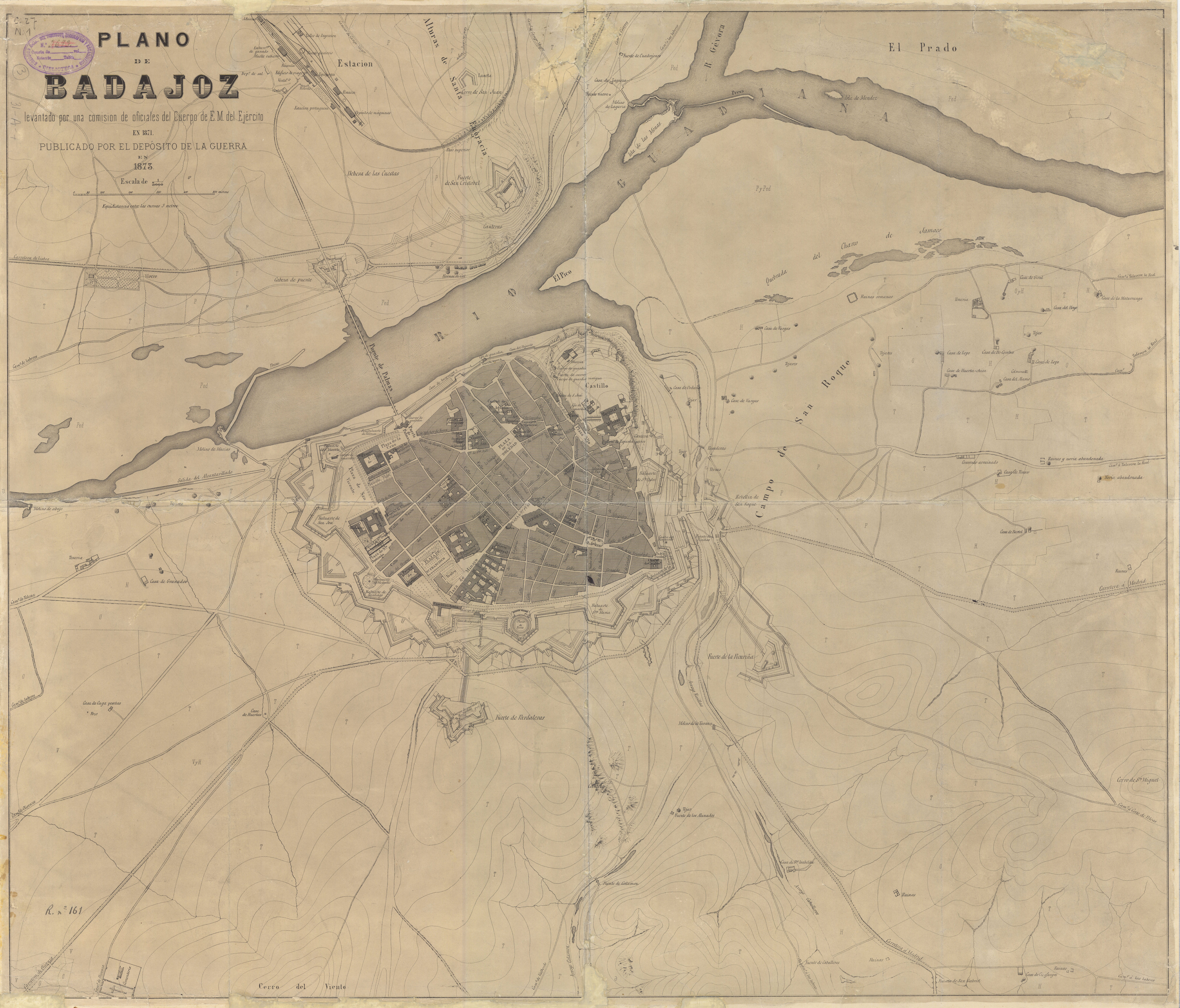 Plano detallado que representa la ciudad con su recinto amurallado y los fuertes que la rodean Relieve por curvas de nivel, equidistancia entre las curvas 3 metros